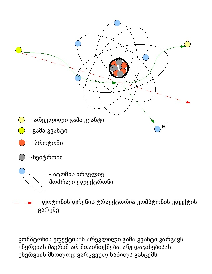 კომპტონის ეფექტი